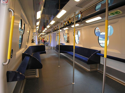 迪士尼線